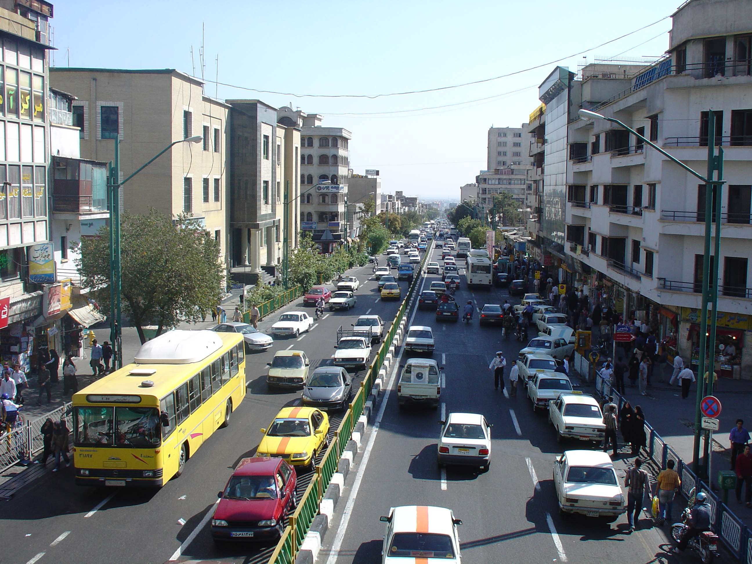 Kargar Ave. in Tehran